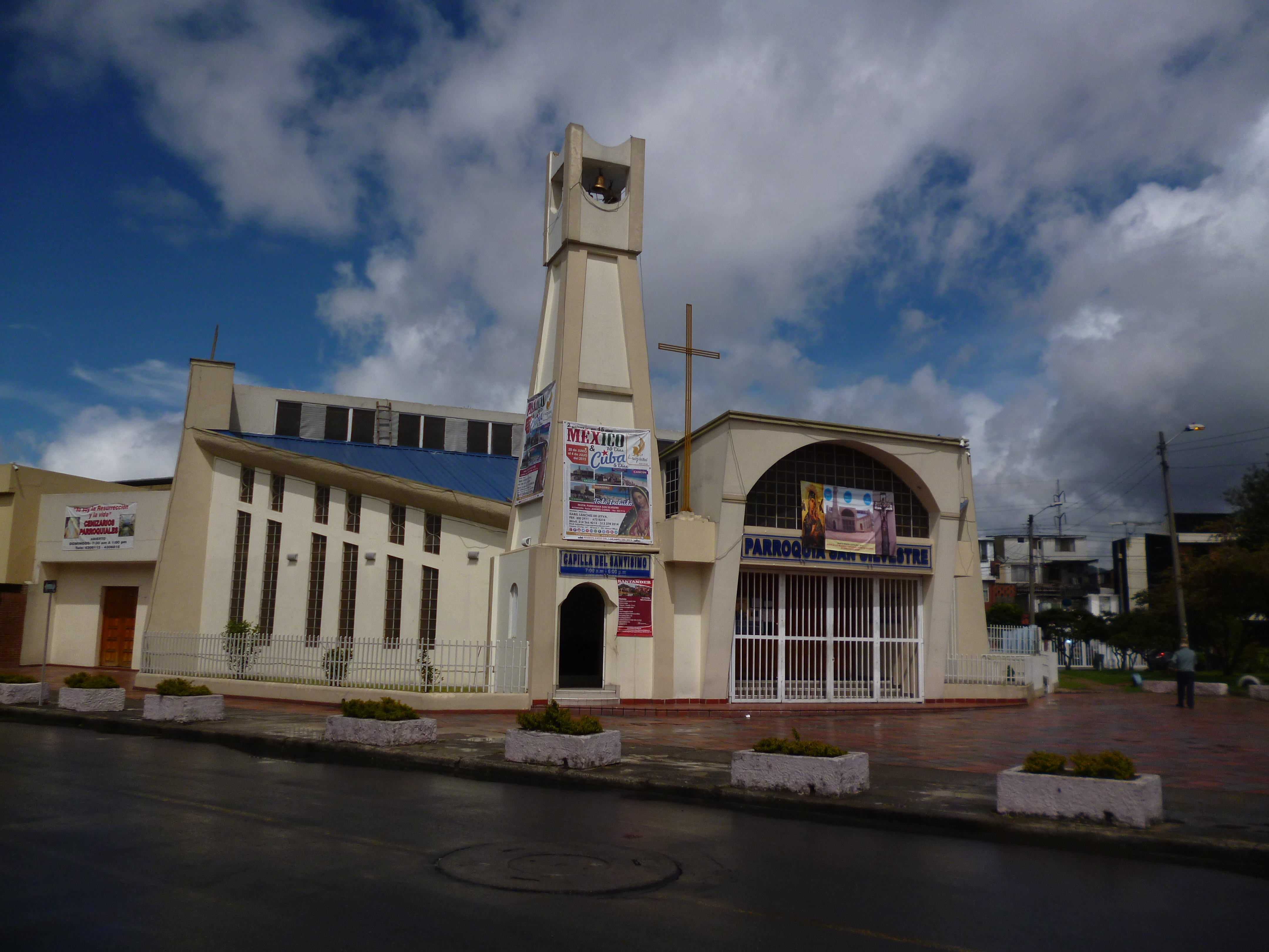 barrio de bogotá